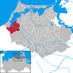 Ribnitz-Damgarten in Mecklenburg-Vorpommern - District Nordvorpommern